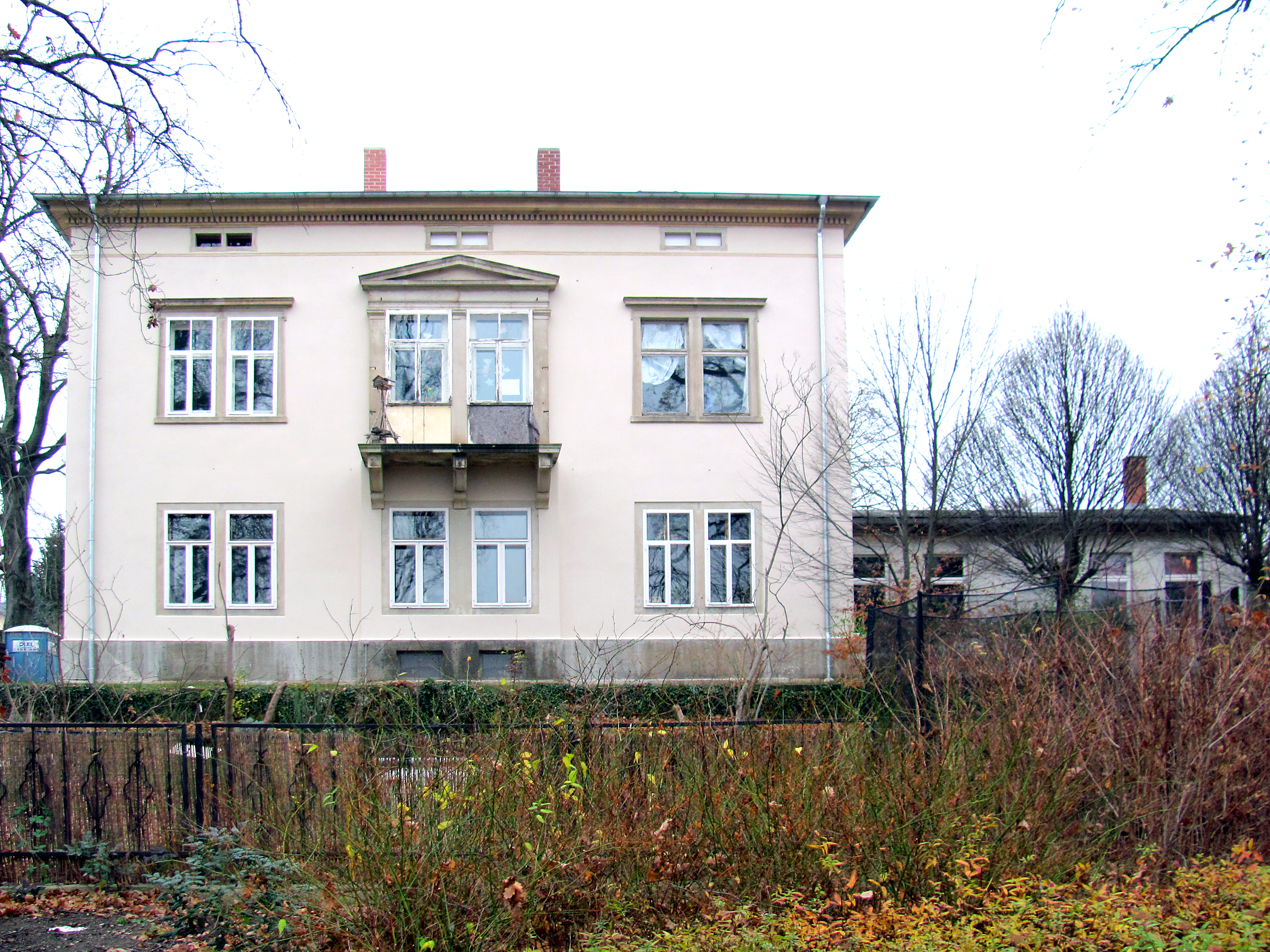 Radebeul-Niederlößnitz, Landhaus Schuchstraße 2 mit Nebengebäude, von der Meißner Straße aus